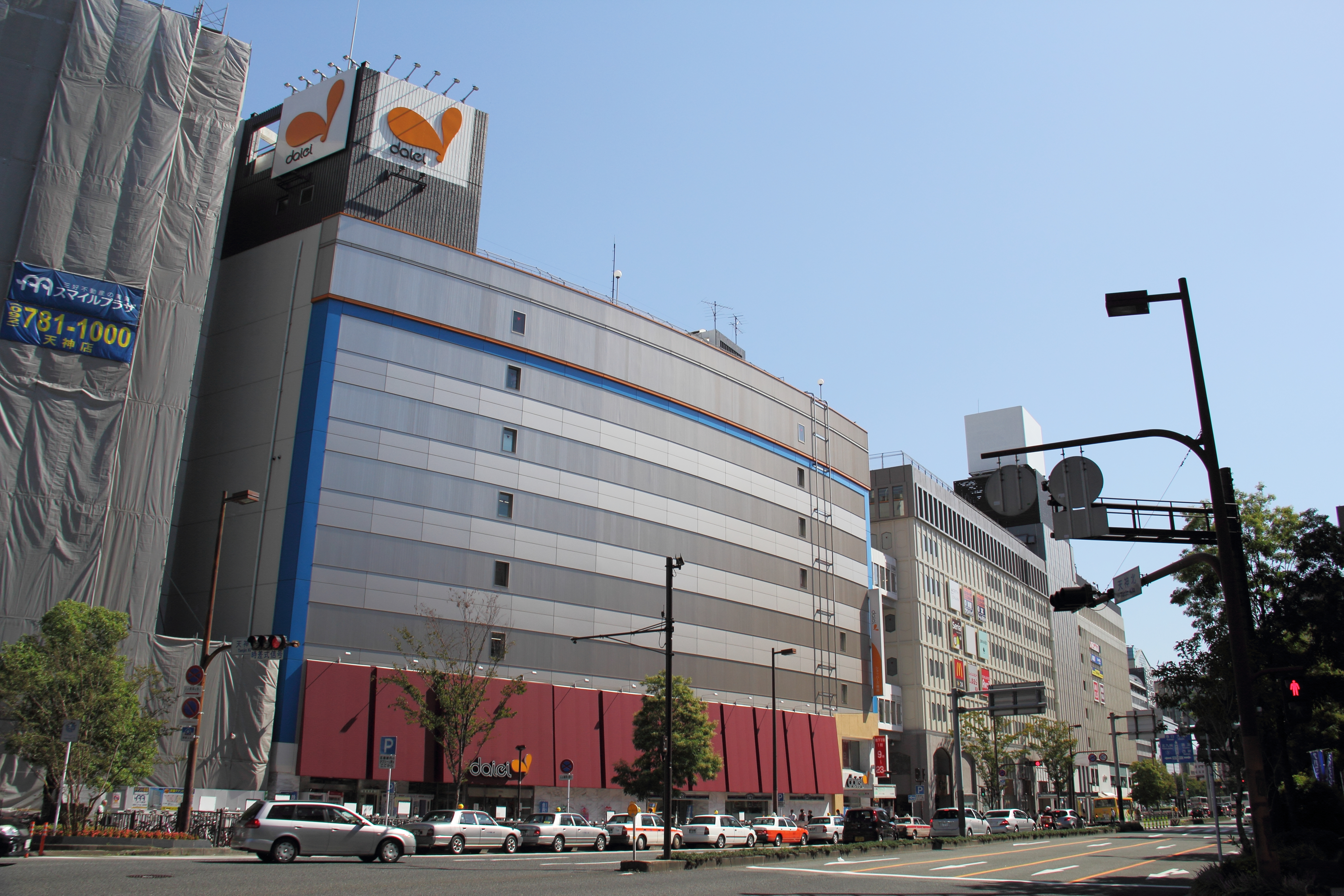 外装リニューアル後のダイエーショッパーズ福岡店（現：イオンショッパーズ福岡店）Canon EOS 60D